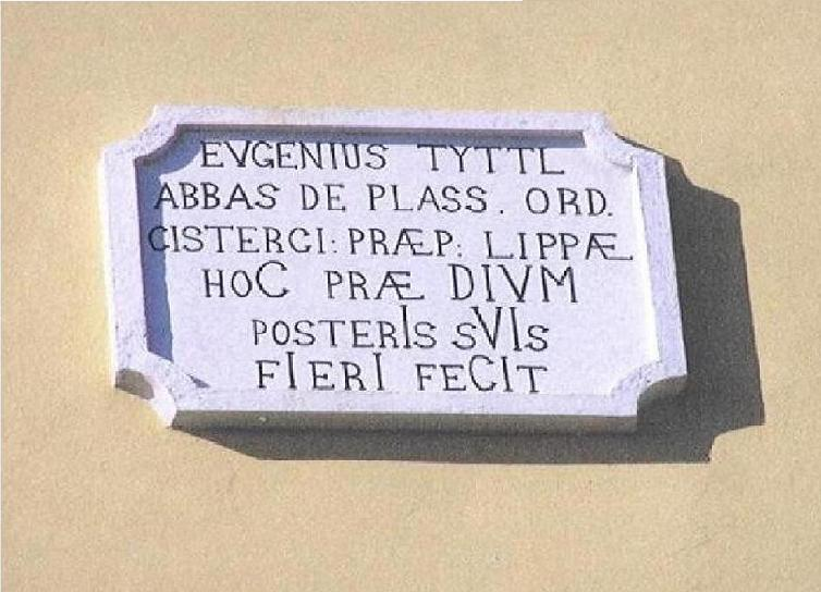 Latinský Napís Kalce